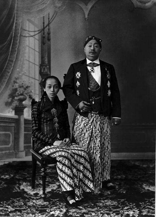 Foto. Susuhunan van Surakarta, Pakoe Boewono X met echtgenote